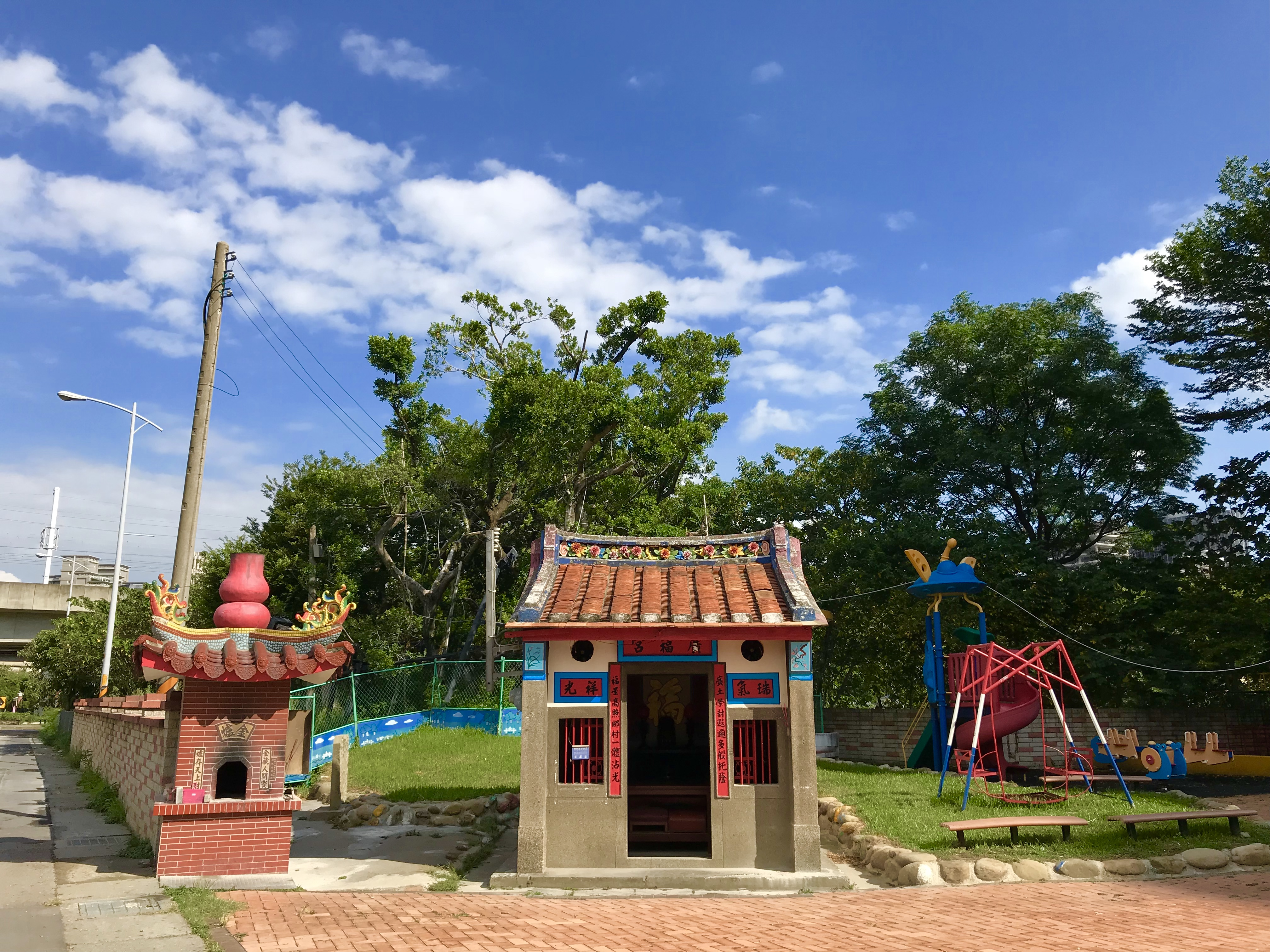 隘口伯公廣福宮正面照